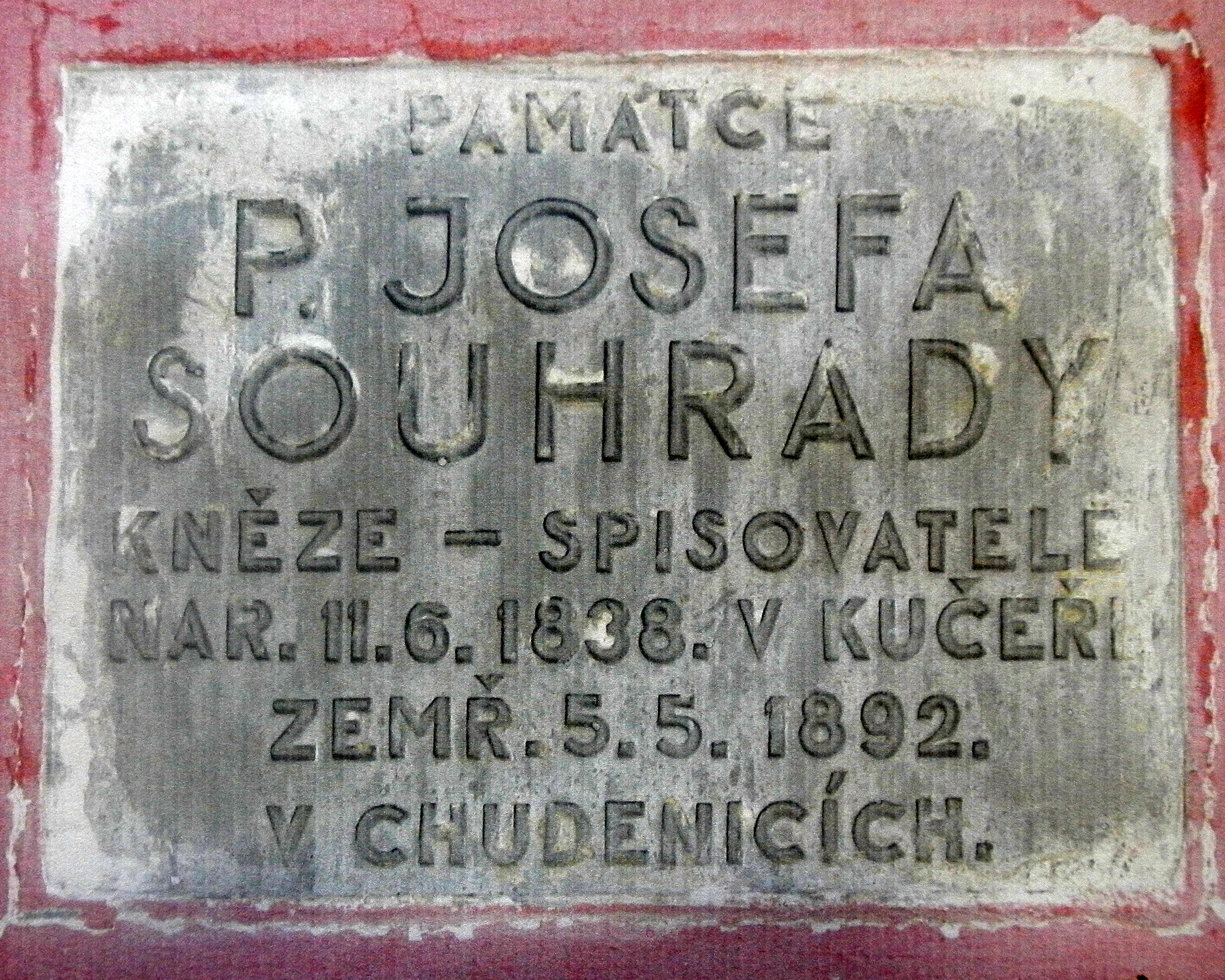 Gedenktafel an den Priester und Schriftsteller Josef Souhrada, Kucera 1838 - Chudenitz 1892